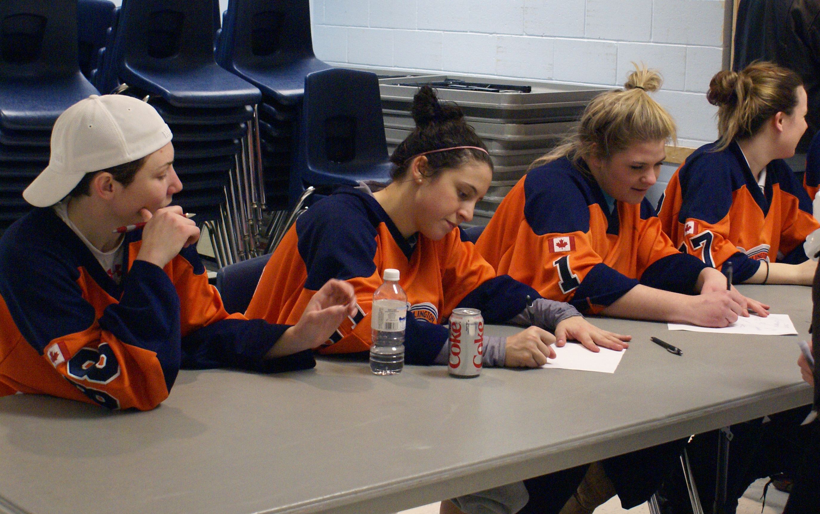 Barracudas